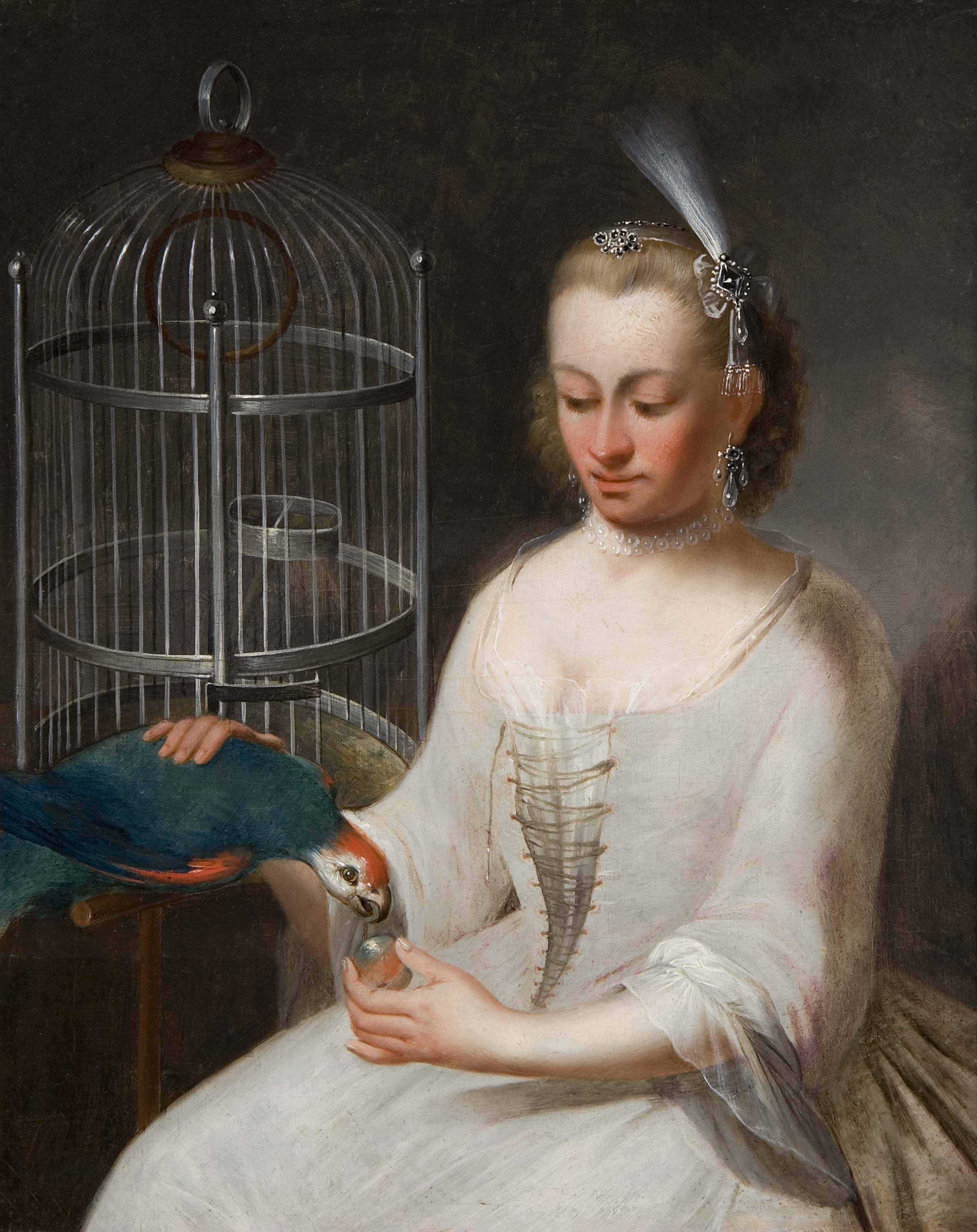 "Dame mit Papagei und Vogelkäfig", Öl auf Holz, monogrammiert, 22.5 x 18.5 cm